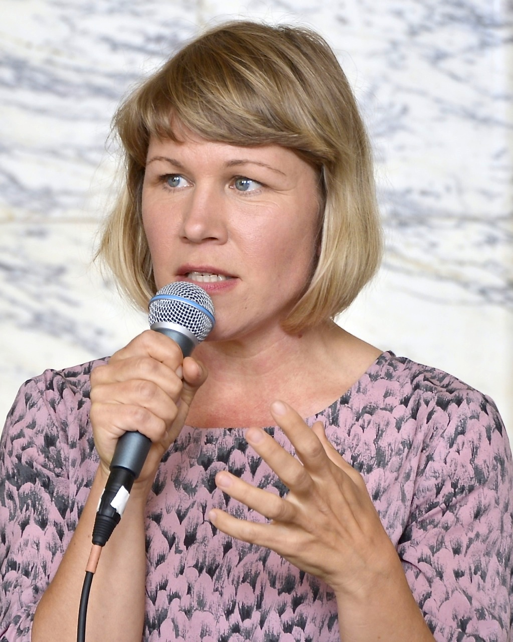 Regissören Jenny Andreasson på Öppet hus på Dramaten den 6 september 2014.